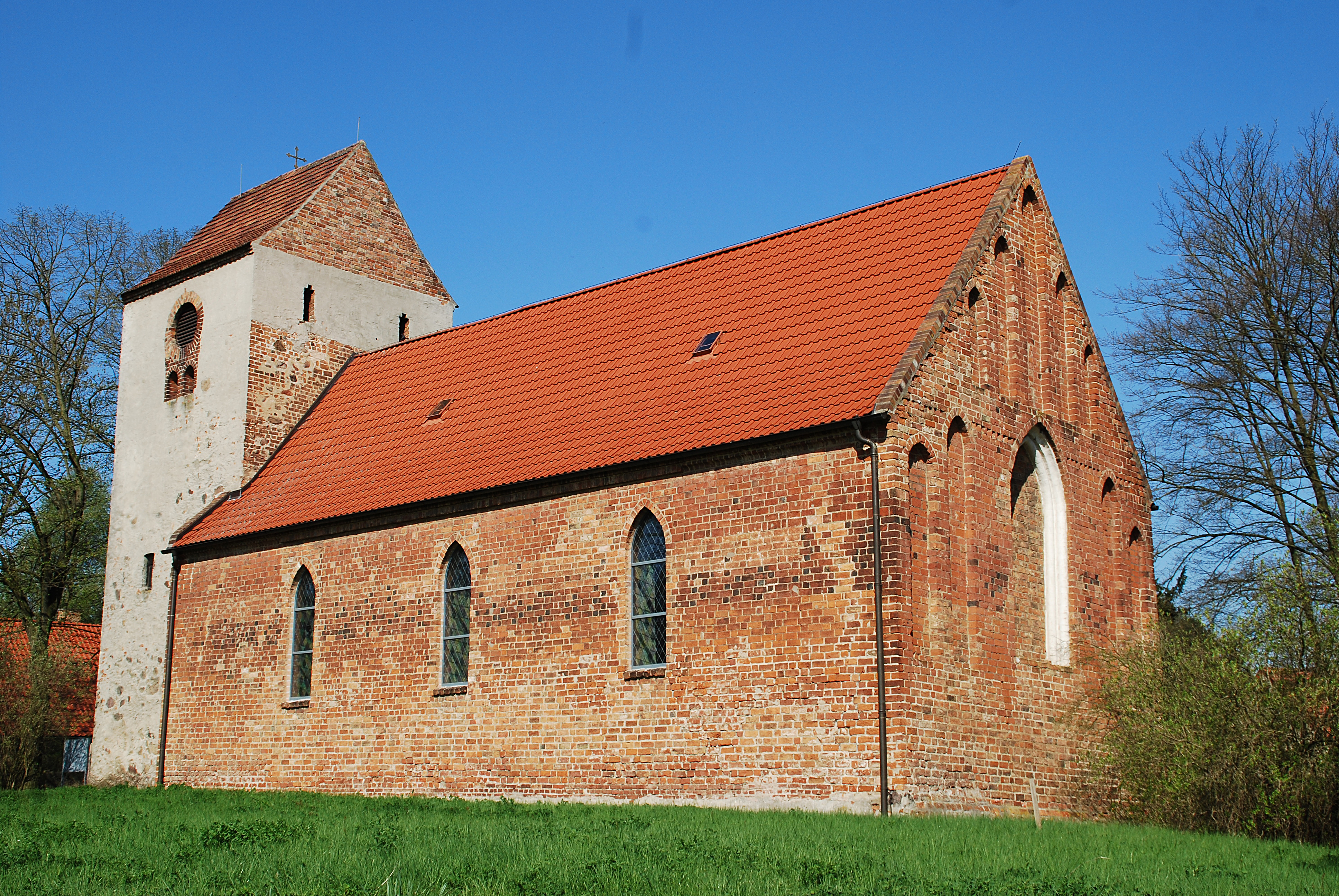 Frankfurt (Oder) Ortsteil Güldendorf, Kirche